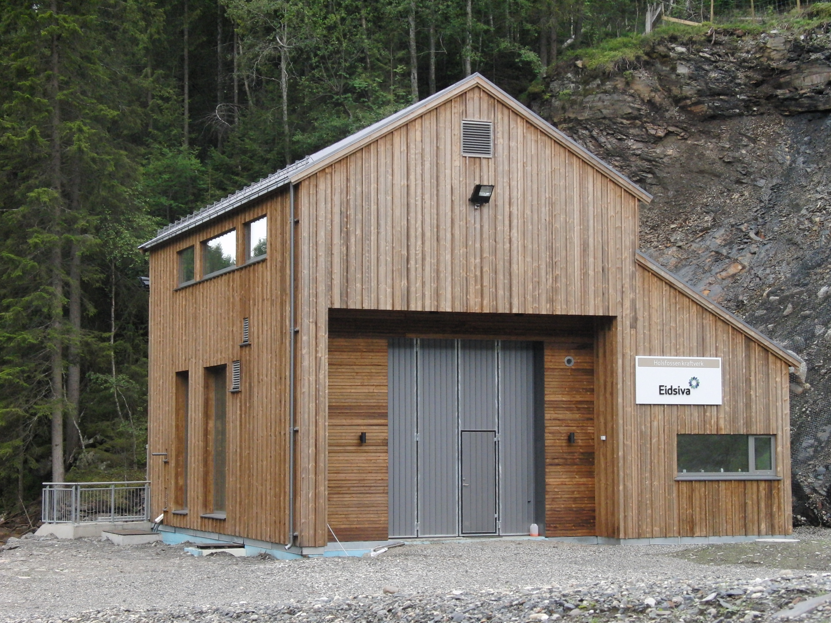 Holsfossen kraftverk